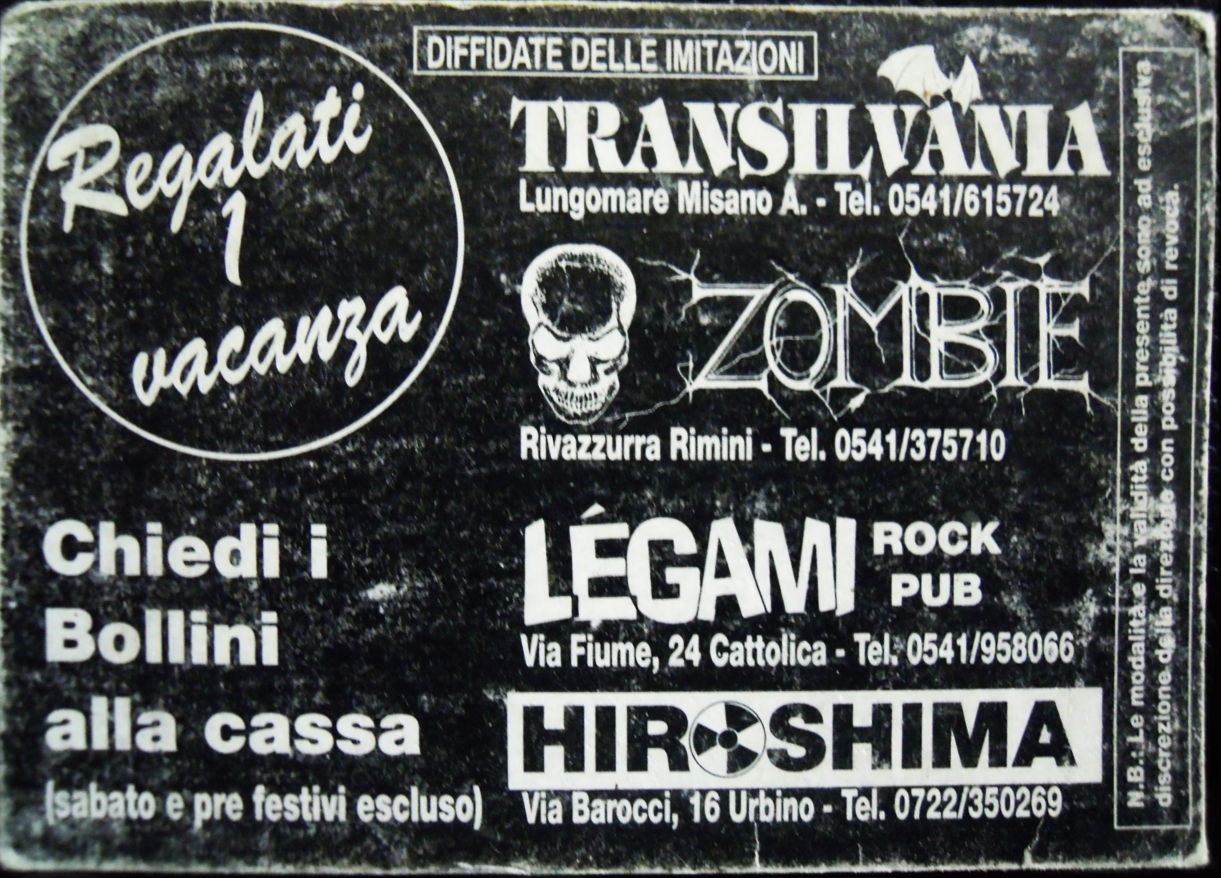 Questa tessere veniva regalata ad ogni cliente che a sua volta apponeva un piccolo adesivo sul retro ad ogni consumazione in uno dei suddetti locali, a tessera completata riceveva un buono valido per due persone presso un'agenzia viaggi con varie destinazioni a scelta.